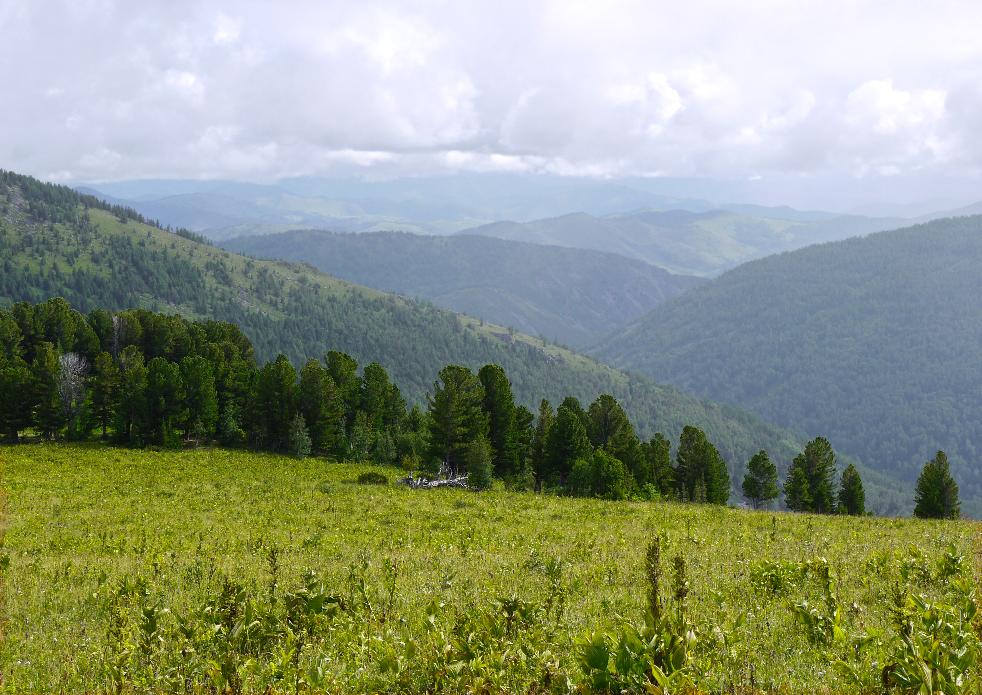 Чарышский заказник: Чарышский район, Алтайский край This image is related to the protected area of Russia number 2210206